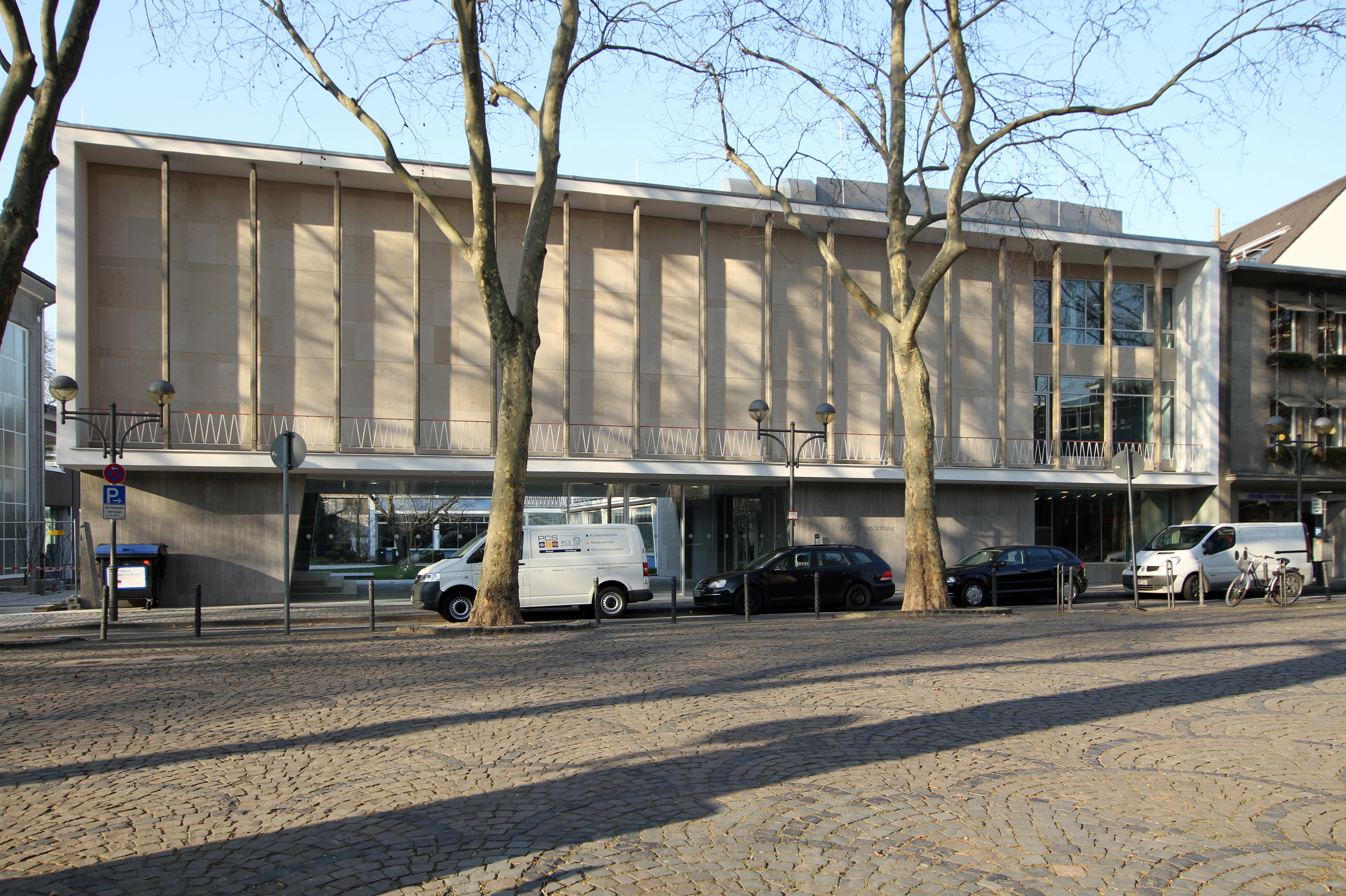 Köln Altstadt-Nord, Apostelnkloster 13-15. Ehemaliges Amerika Haus, heutiger Sitz der Fritz Thyssen Stiftung This is a photograph of an architectural monument.